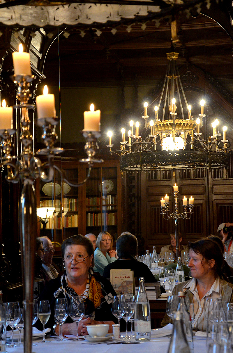 Zu einer Weinprobe mit Lesung der Autorin Barbara Schlüter aus ihrem 2014 erschienenen Roman Verheimlichte Liebe hatte der Freundeskreis Hannover geladen. Die Veranstaltung fand am 27. Mai 2014 in dem von der hannoverschen Königin Marie an den Opersänger Georg Nollet geschenkten Salle Nollet statt ...